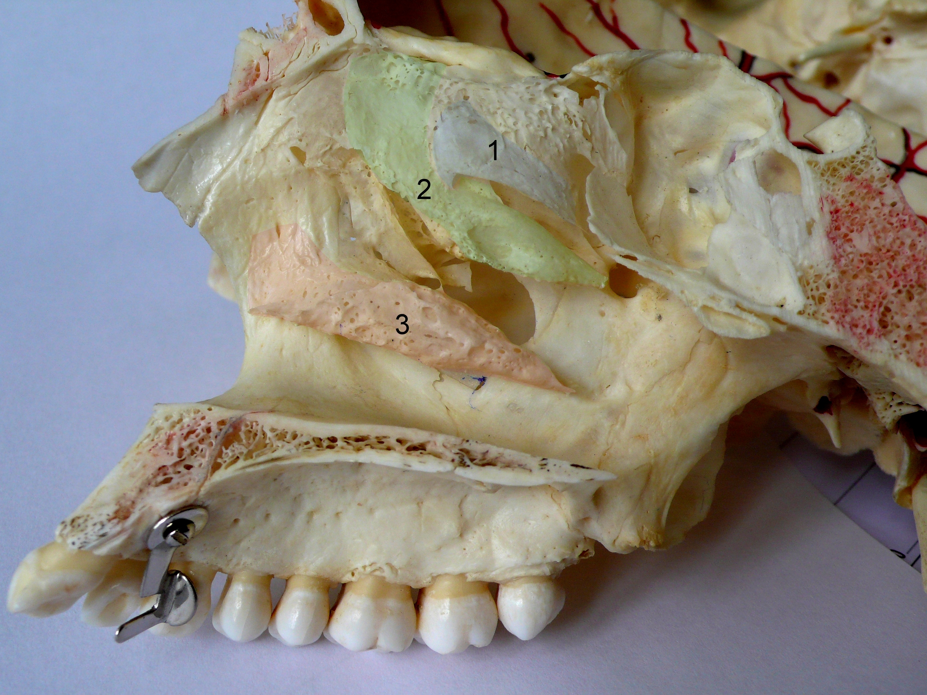 Mensch, laterale Nasenwand. Nasenmuscheln (Conchae nasales). 1 obere, 2 mittlere, 3 untere Nasenmuschel.